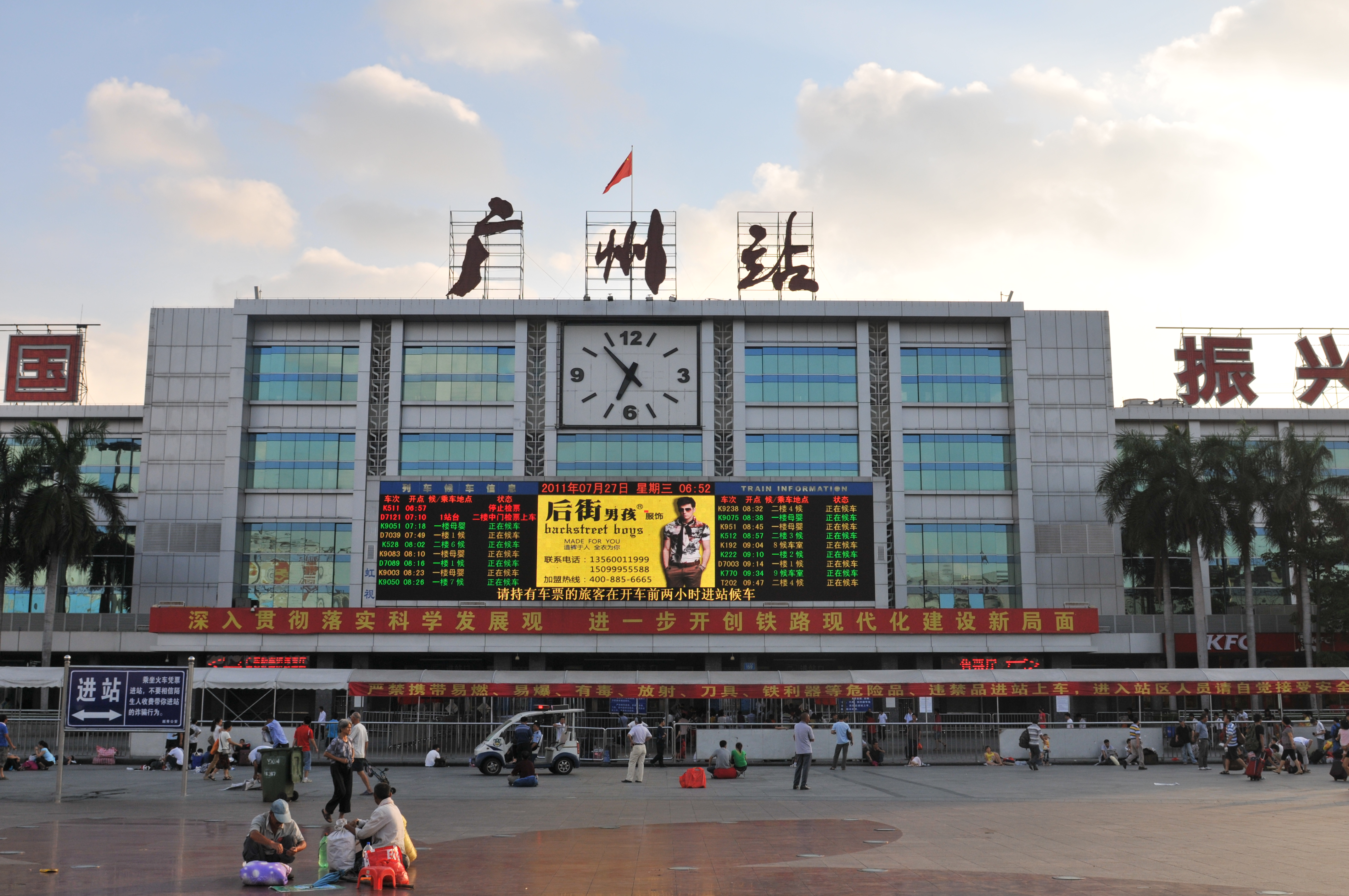 中国广东省广州市越秀区 China Yuexiu District, Guangzhou City, Guangdong ProvinceChina Xinjiang Urumqi Welcome you to tour the, Китай Синьцзяна Урумчи приветствовать Вас на экскурсию, الصين ترحب زيارتك لاورومتشى فى شينجيانغ, 中国新疆のウルムチへの訪問を歓迎する, 中国新疆乌鲁木齐欢迎您来观光旅游